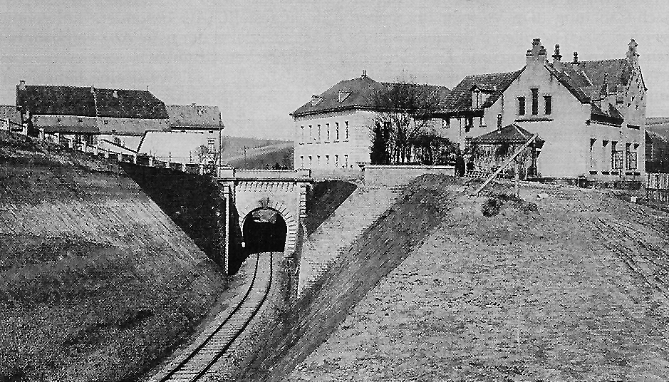 Meisenheimer Tunnel vor dem zweigleisigen Ausbau der Strecke